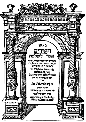 דף השער של ההוצאה הראשונה בדפוס לקובץ "השירים אשר לשלמה"